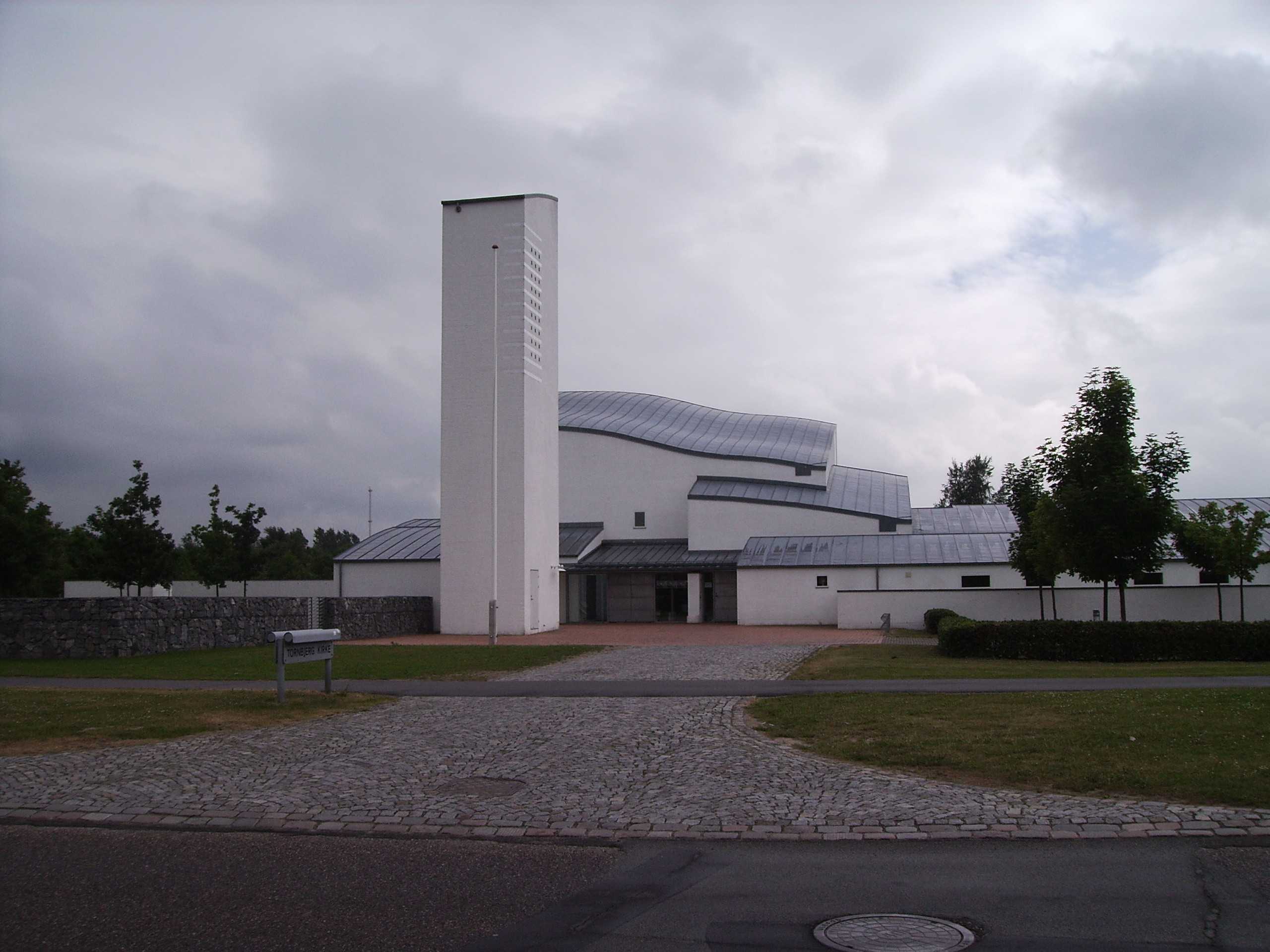 Tornbjerg Kirke, Tornbjerg Sogn, Åsum Herred, Odense Amt, Denmark (Danish Church)